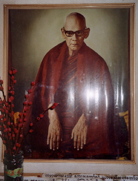 The Venerable Mahasi Sayadaw